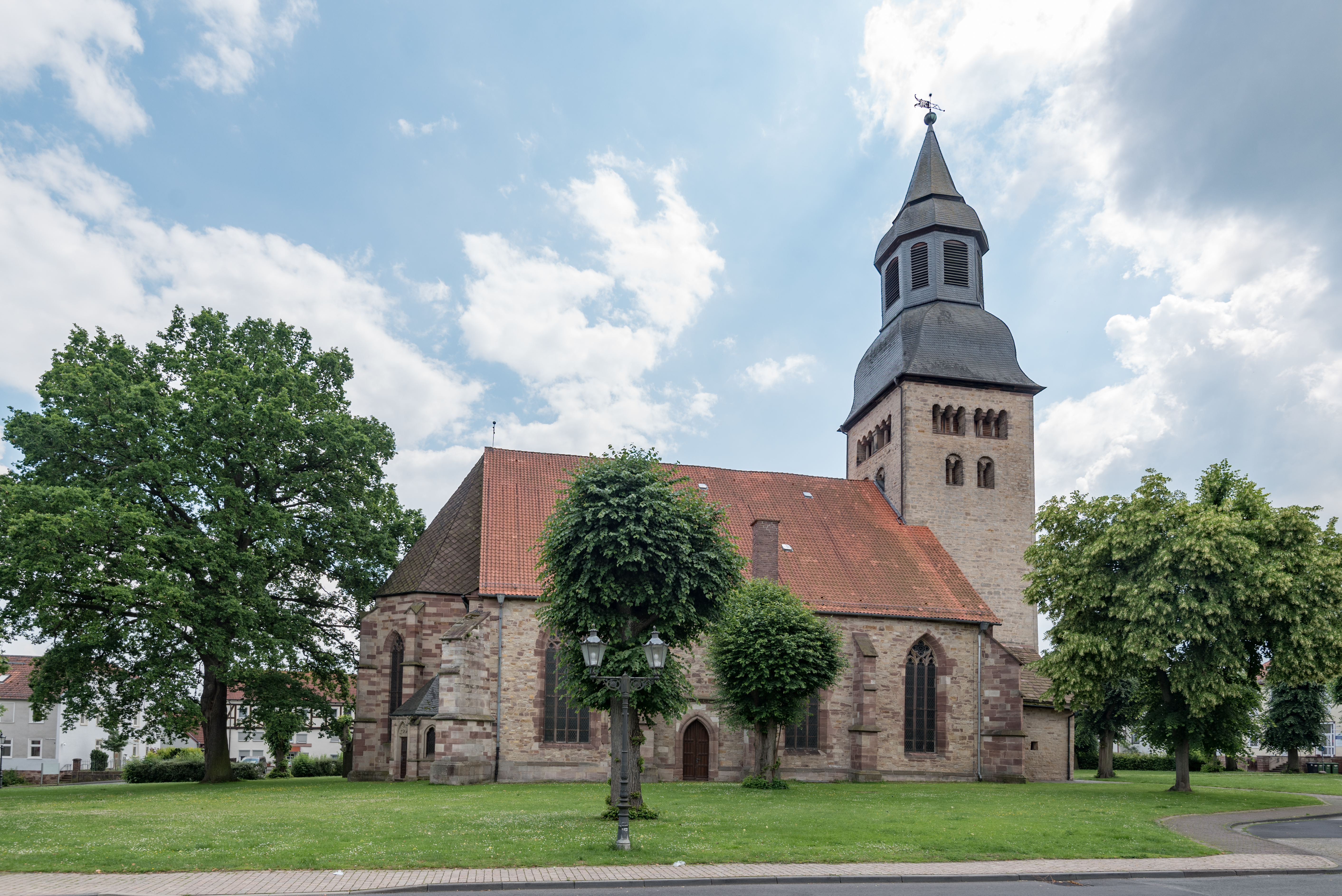 Hofgeismar, Altstädter Kirchplatz 1